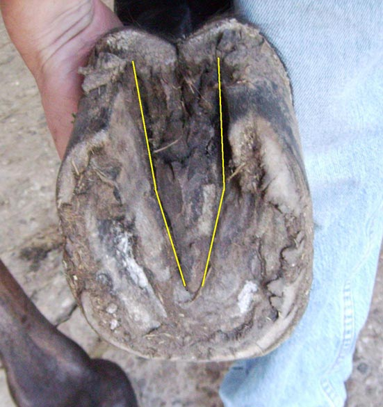 Zwanghuf, typische Strahlform. Eigenes bild.